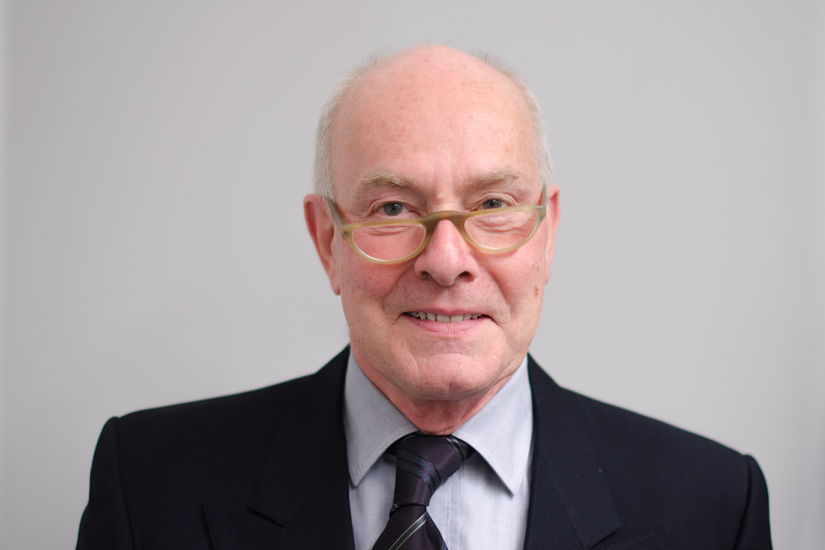 Manfred R. Eisenbach